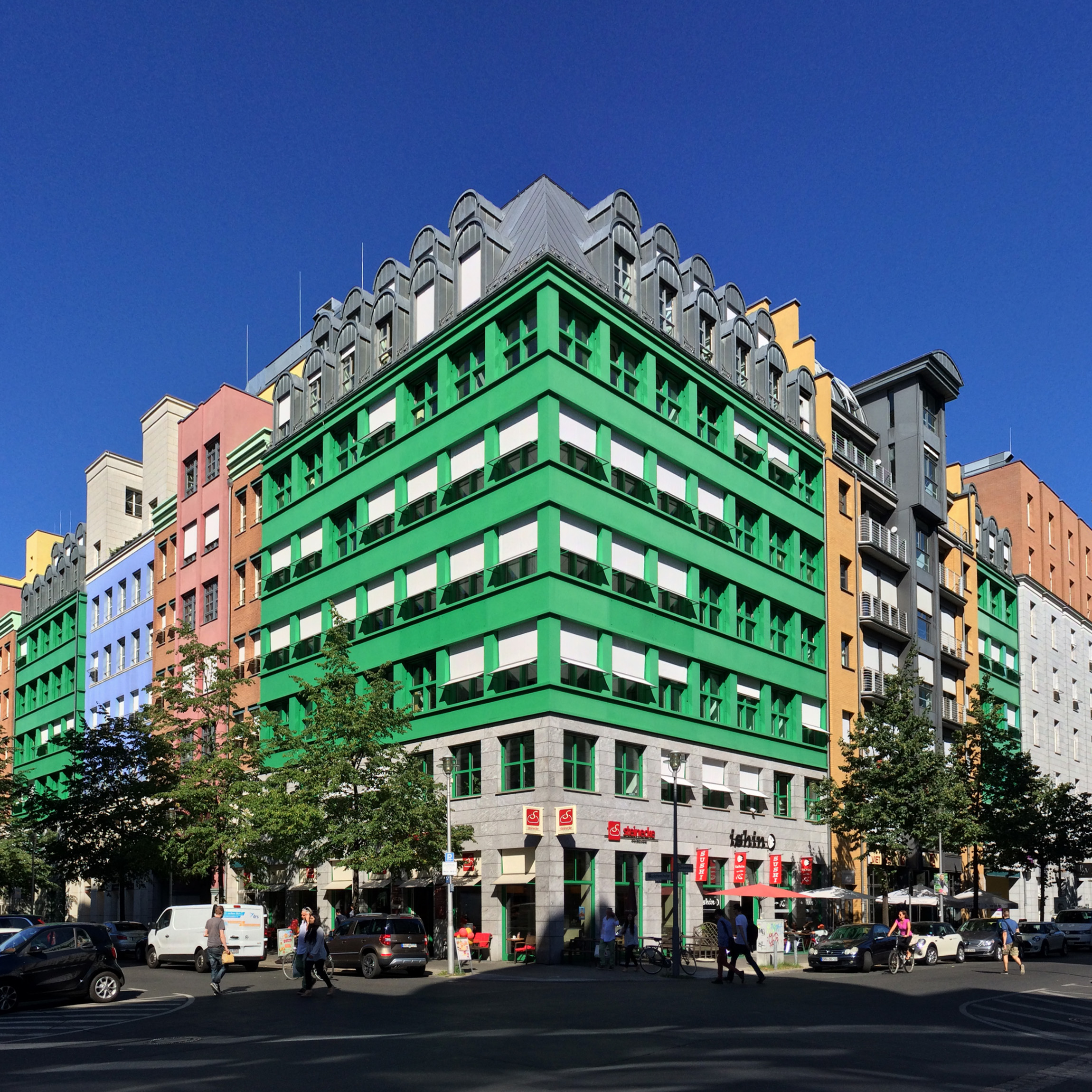 Quartier Schützenstraße, Aldo-Rossi, Berlin-Mitte, Ansicht Charlottenstraße Ecke Zimmerstraße Aufnahme August 2016